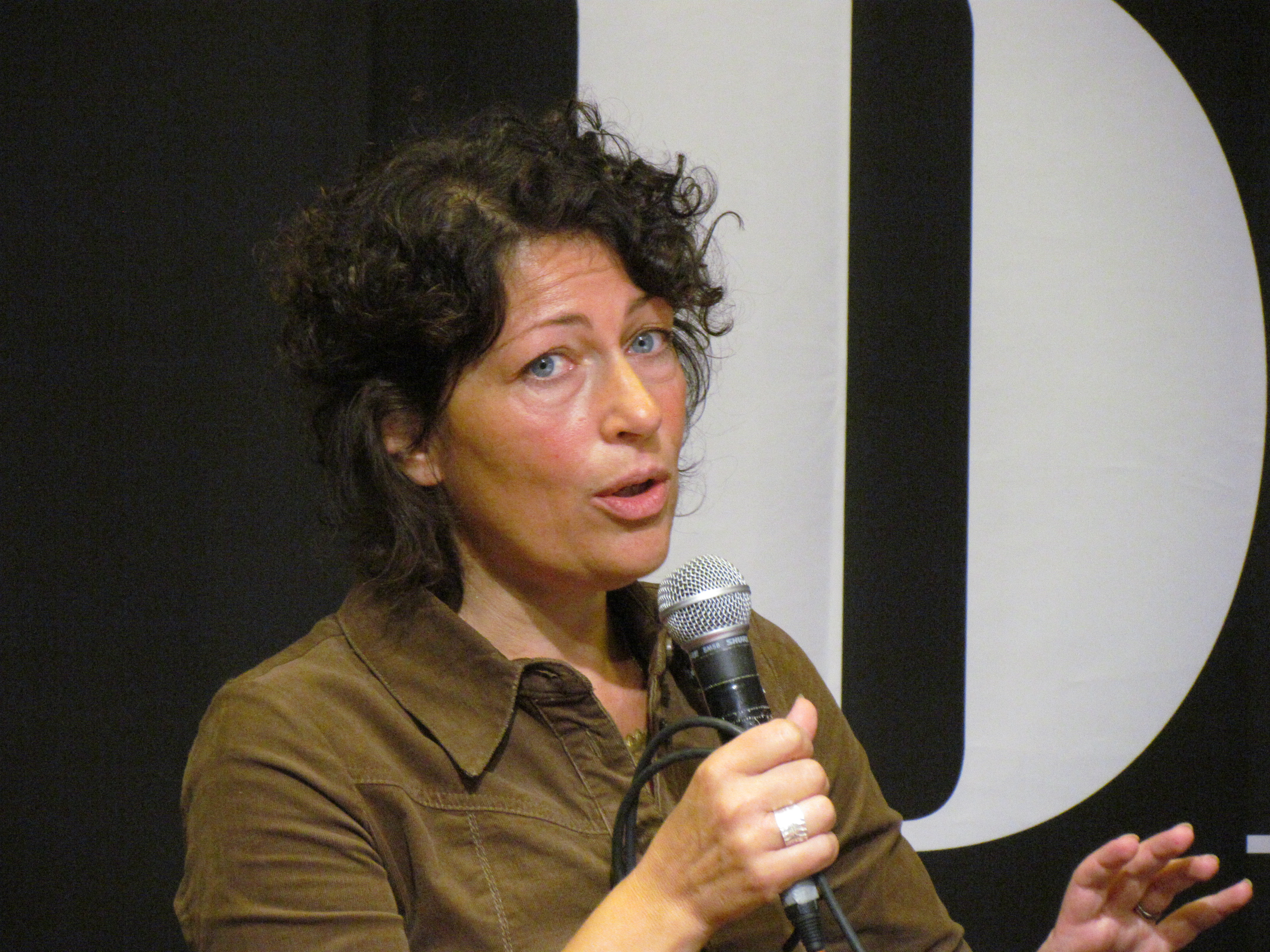 Elisabeth Åsbrink, swedish journalist.